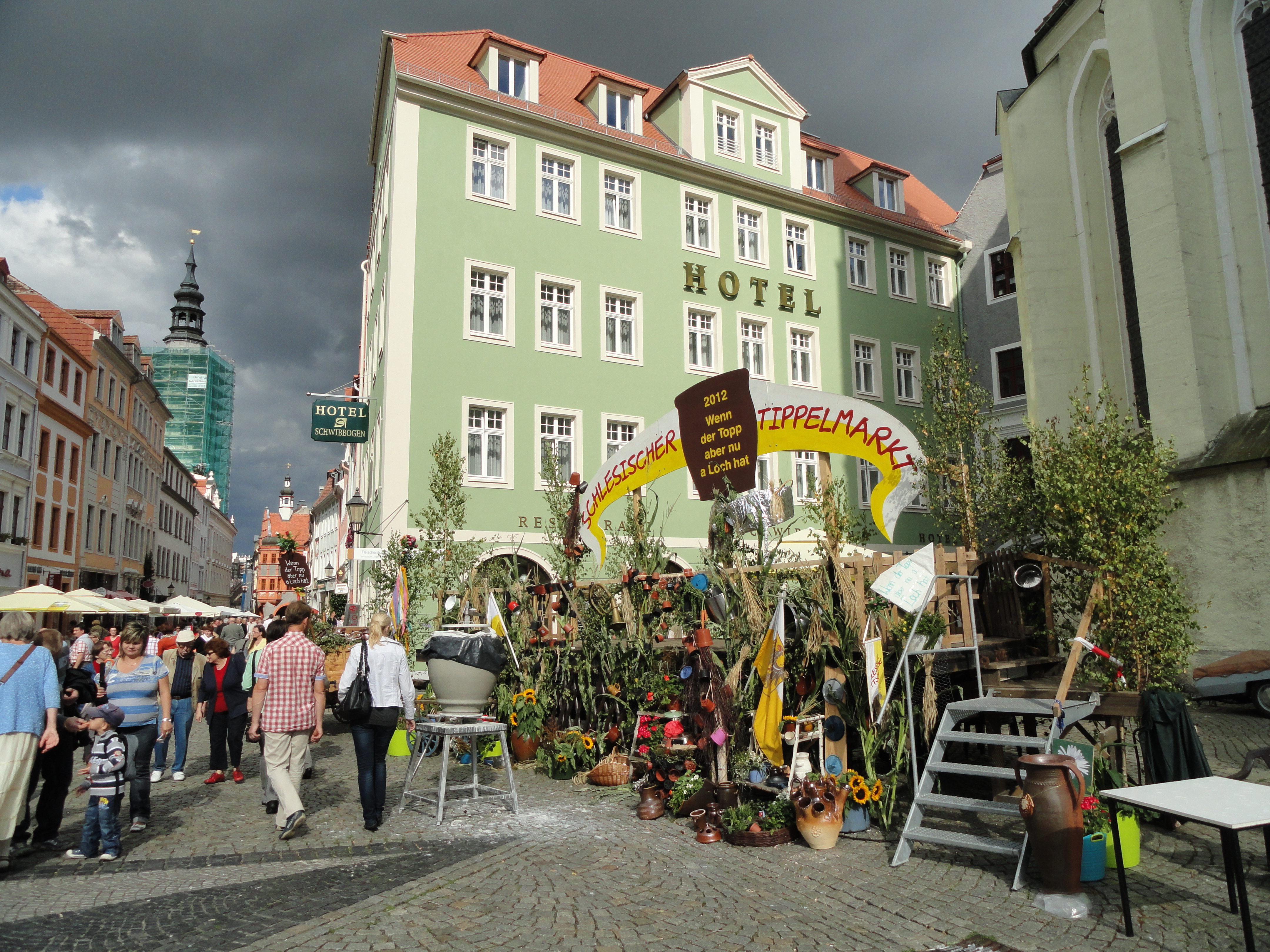 Bühne auf dem Schlesischen Tippelmarkt 2012 vor dem Hotel Schwibbogen auf dem Obermarkt in Görlitz